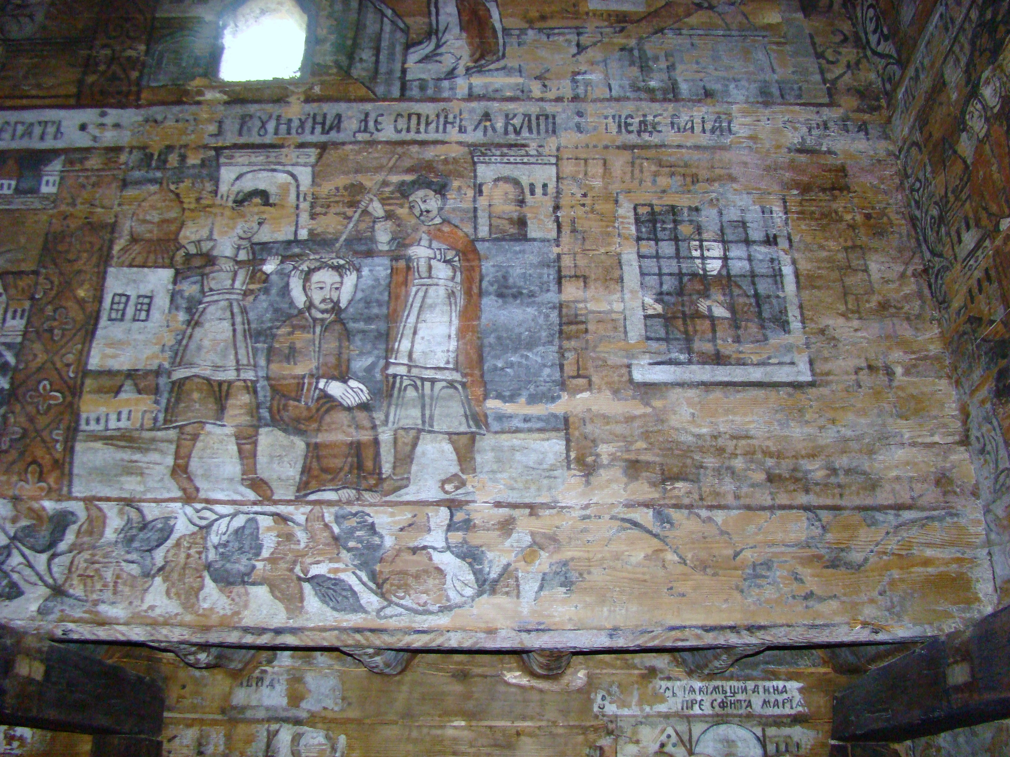 Biserica de lemn "Naşterea Maicii Domnului", sat IEUD